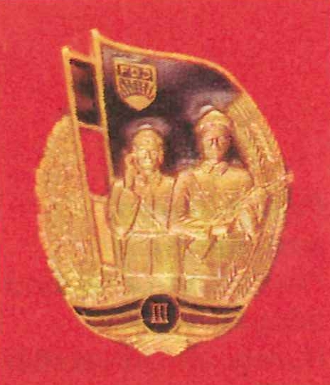 Leistungsabzeichen vormilitärische Ausbildung FDJ